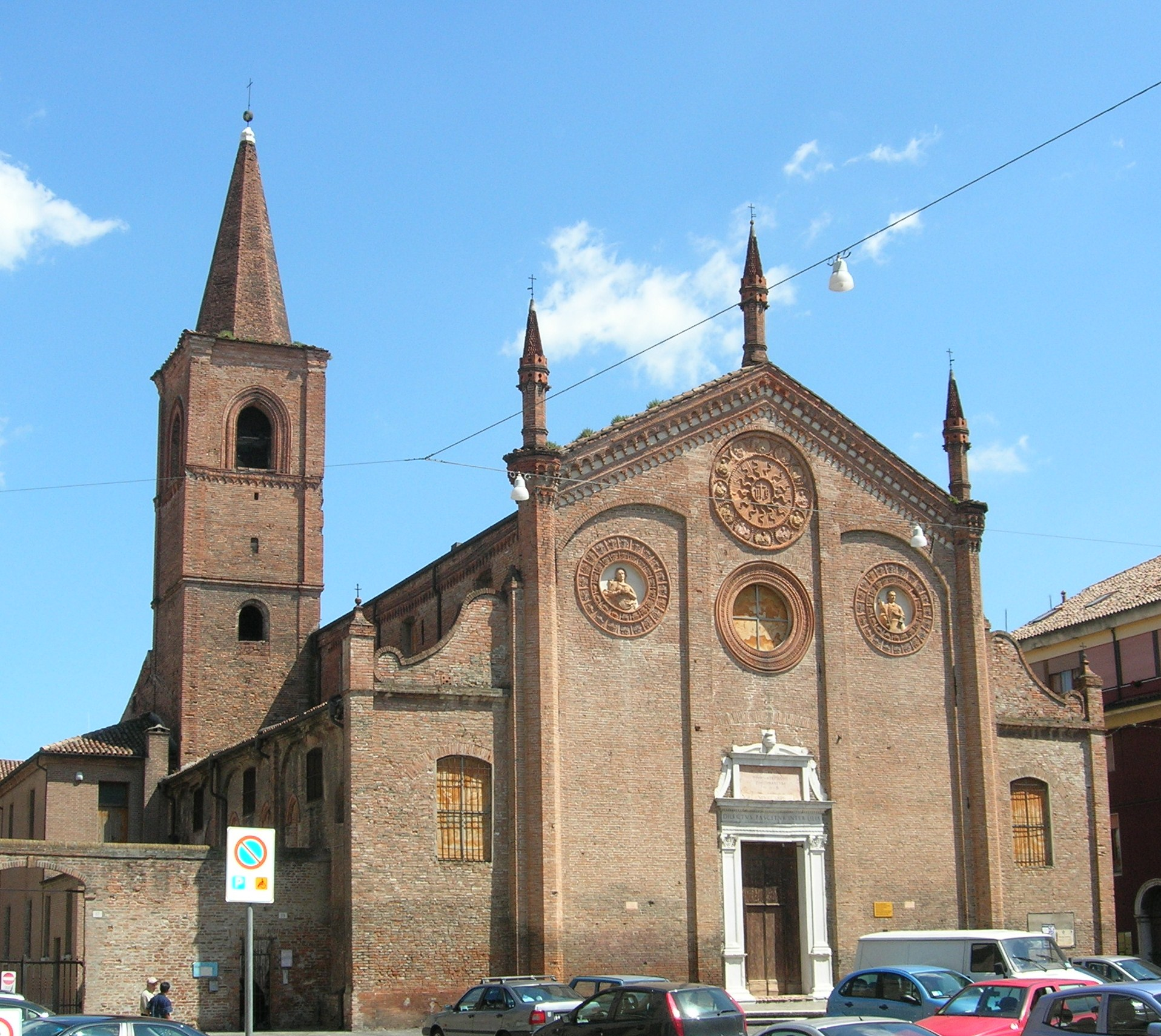 Visione generale della chiesa di Santo Stefano in Ferrara